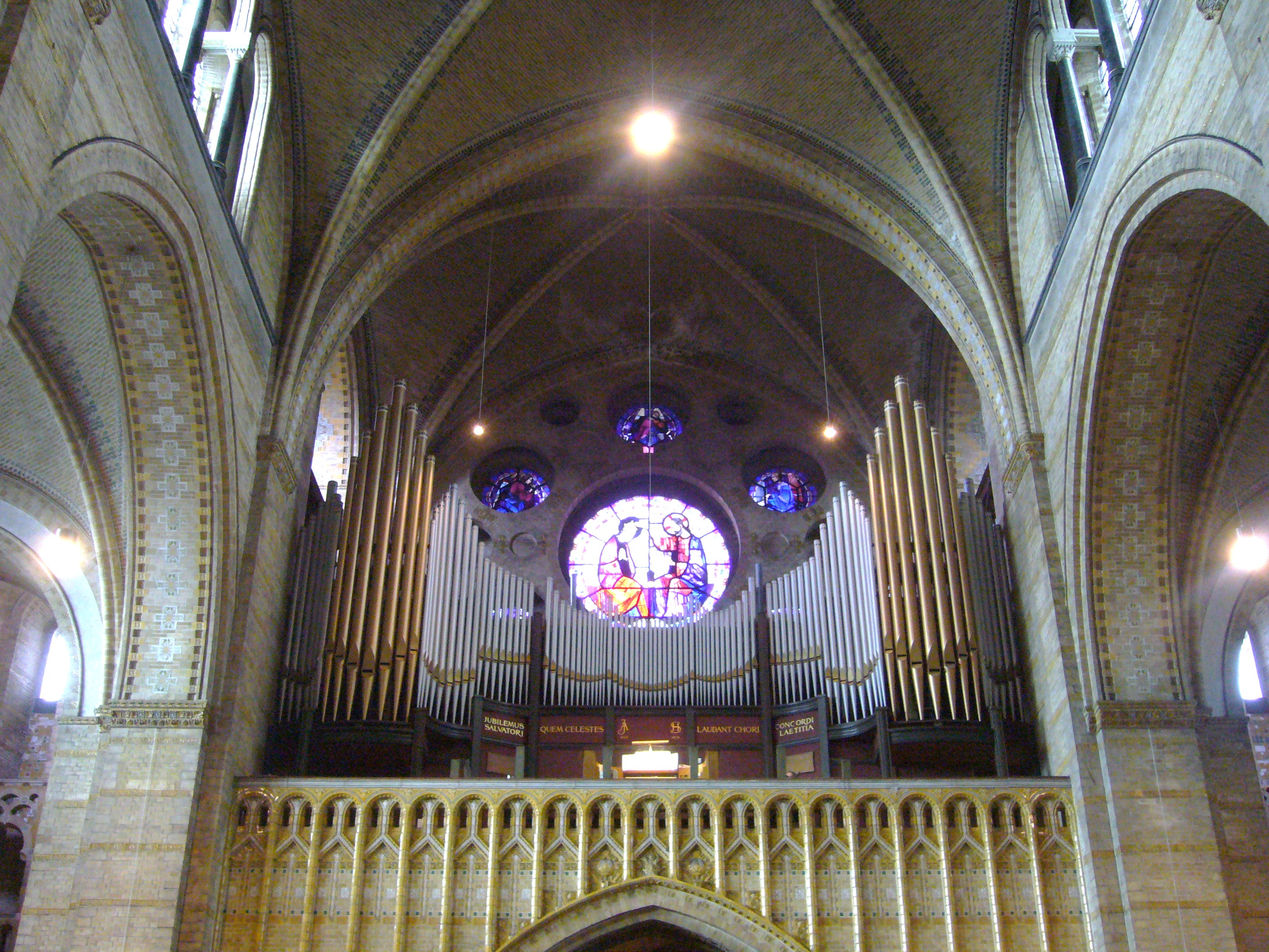 Willibrordusorgel in de St Bavo, Haarlem